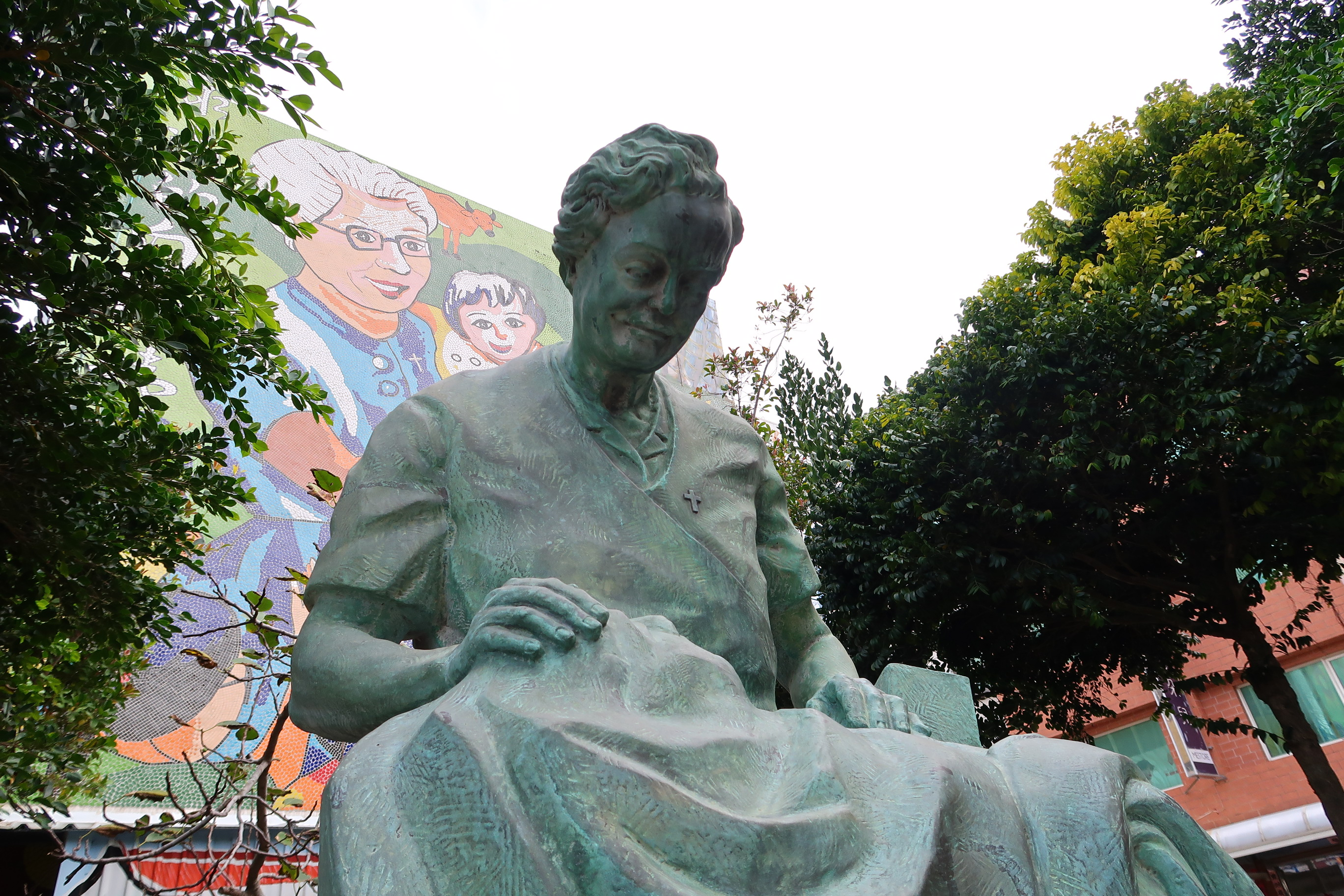 美國籍白寶珠女士紀念塑像，位於台灣澎湖縣馬公市。